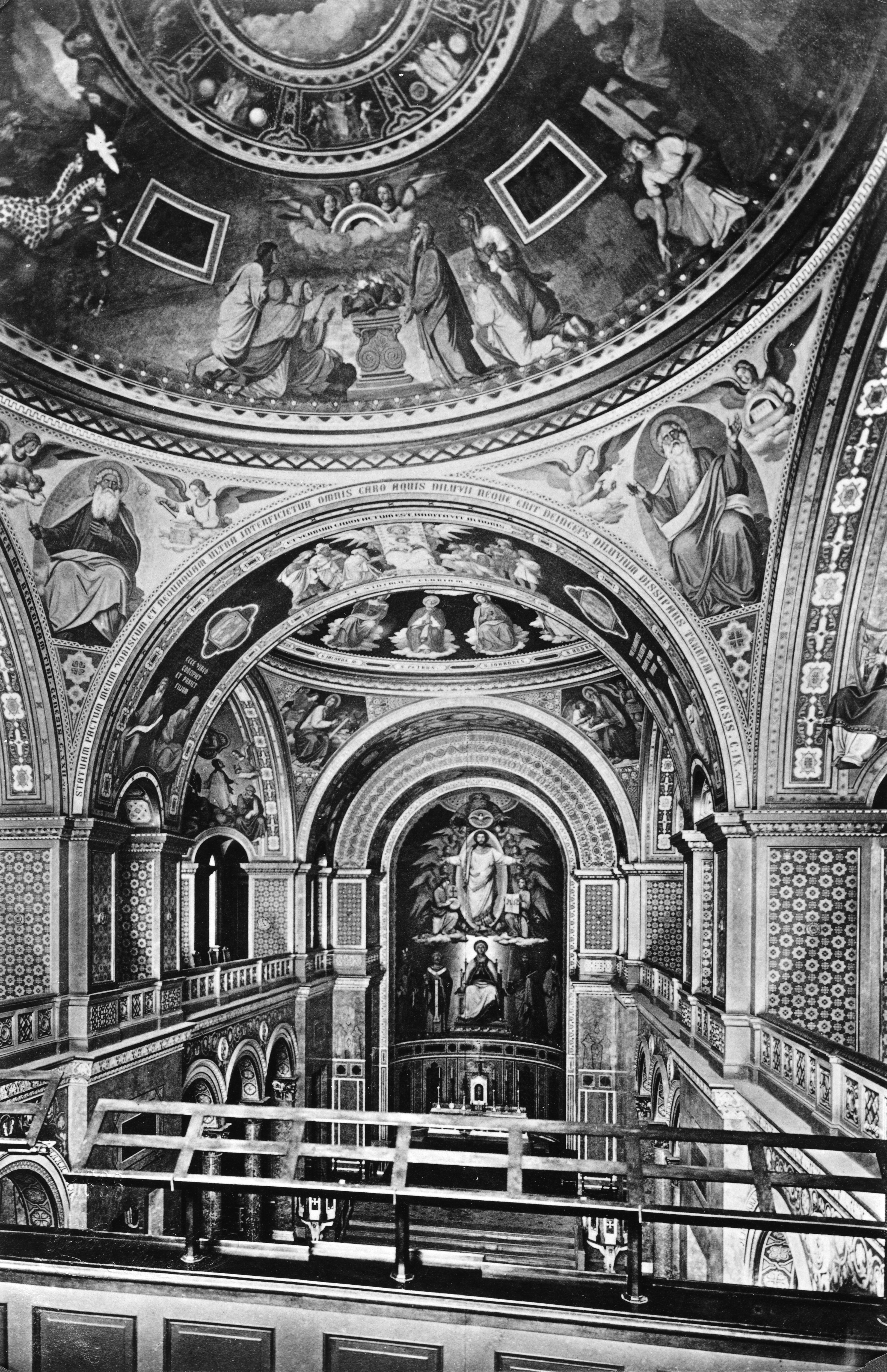 Allerheiligen-Hofkirche München, Innenraum vor der Zerstörung im 2. Weltkrieg